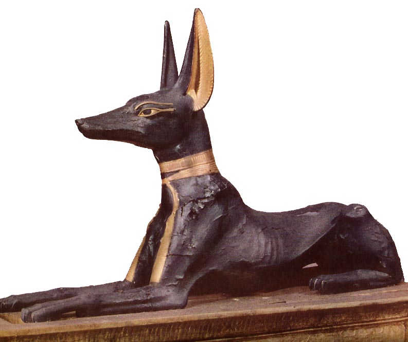 Lo sciacallo anubi rinvenuto nella tomba KV62 di Tutankhamon. Cairo.